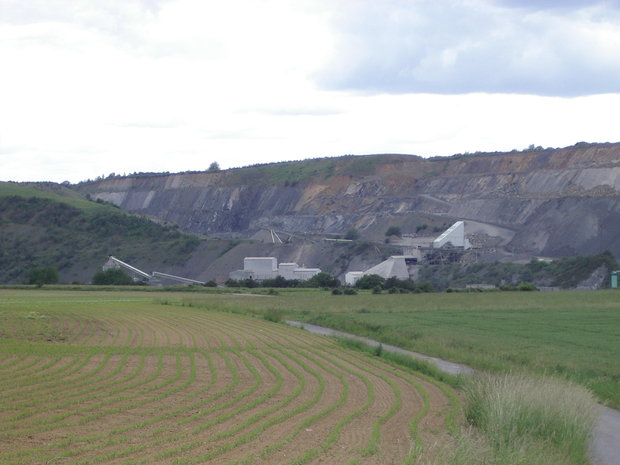 Carrière de Pierre Bleue - Givet - departement des Ardennes- France